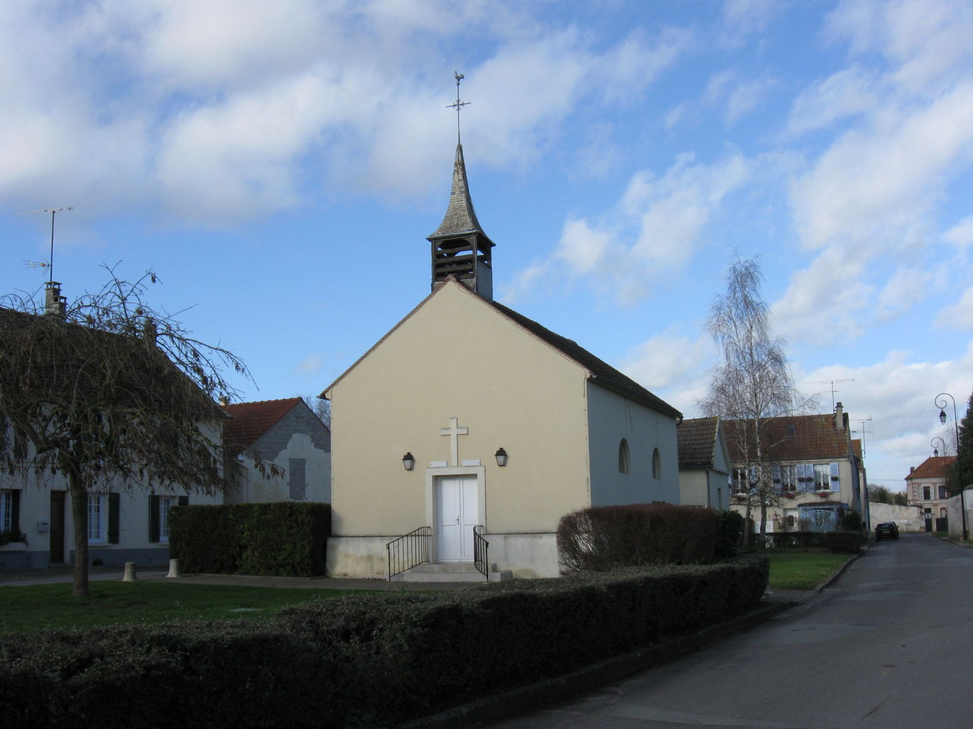 Chapelle Saint-Antoine de Padoue de Poincy. (Seine-et-Marne, région Île-de-France).